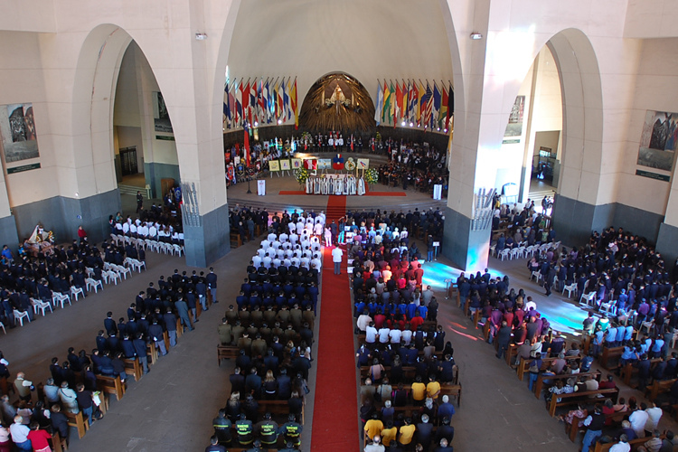 Ceremonia en el Templo Votivo de Maipú.